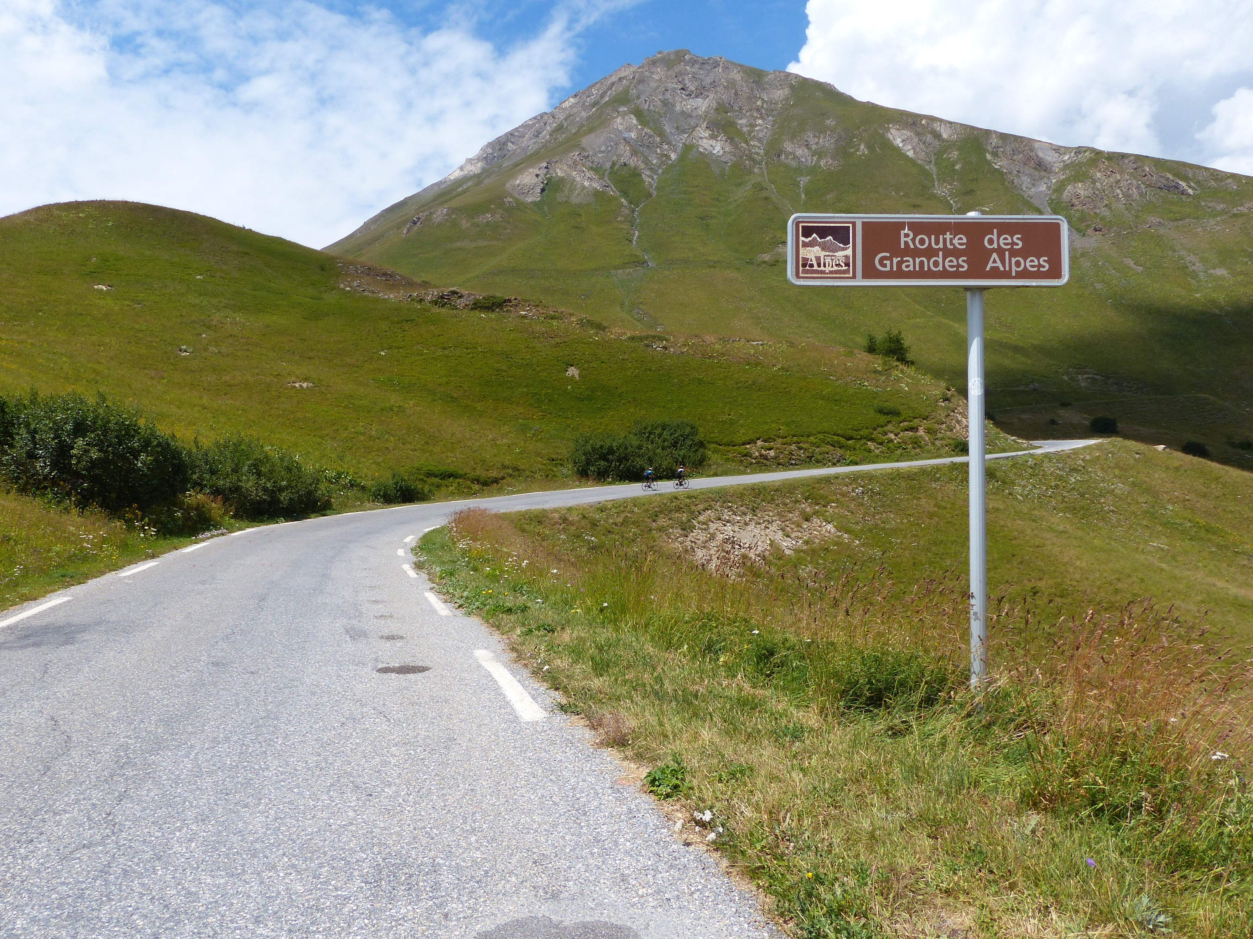 Panneau H21 Route des Grandes Alpes, col du Lautaret, D902 direction col du Galibier, Le Monêtier-les-Bains, Hautes-Alpes, France.